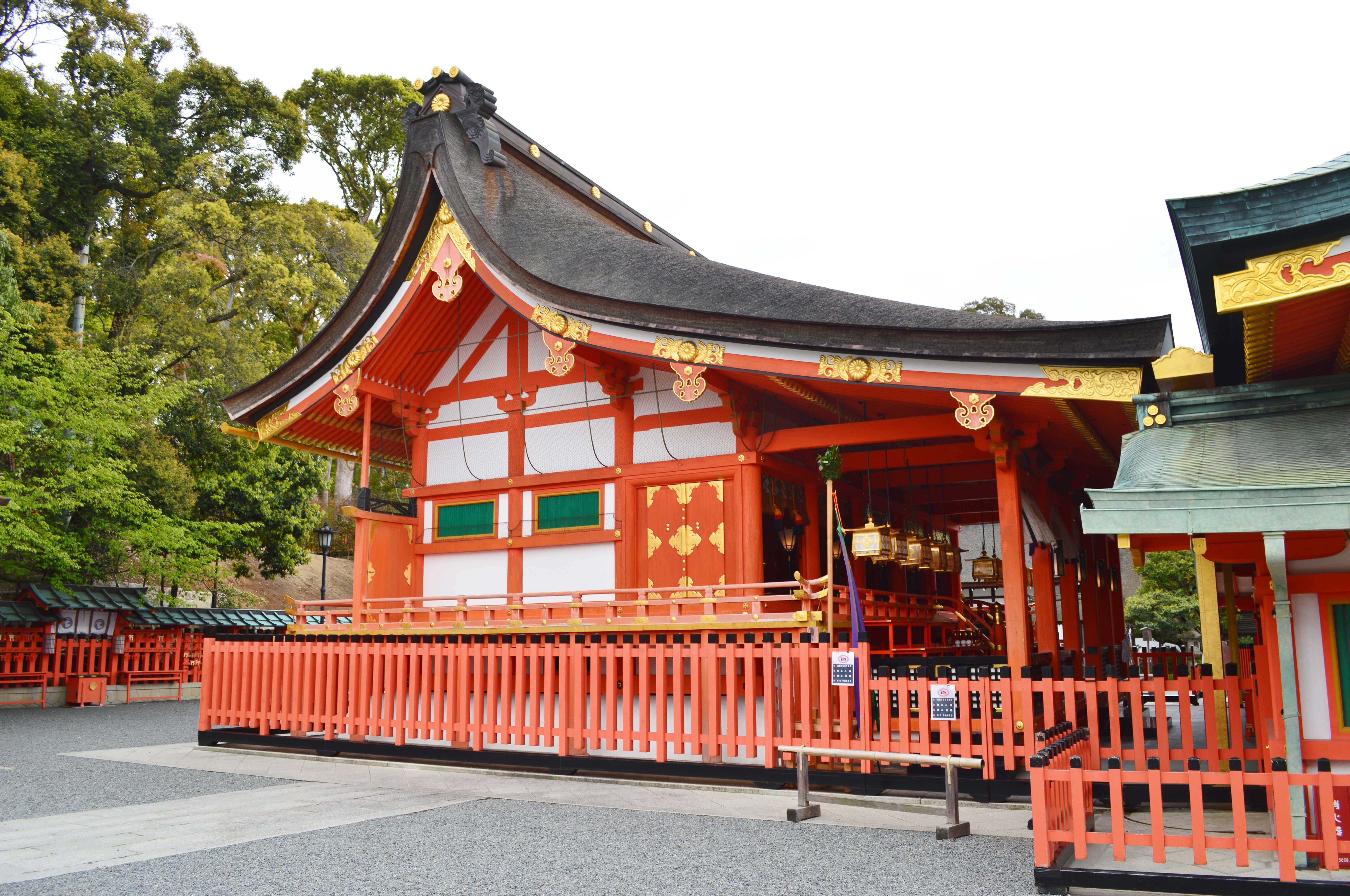 伏見稲荷大社 本殿 Nikon D3200